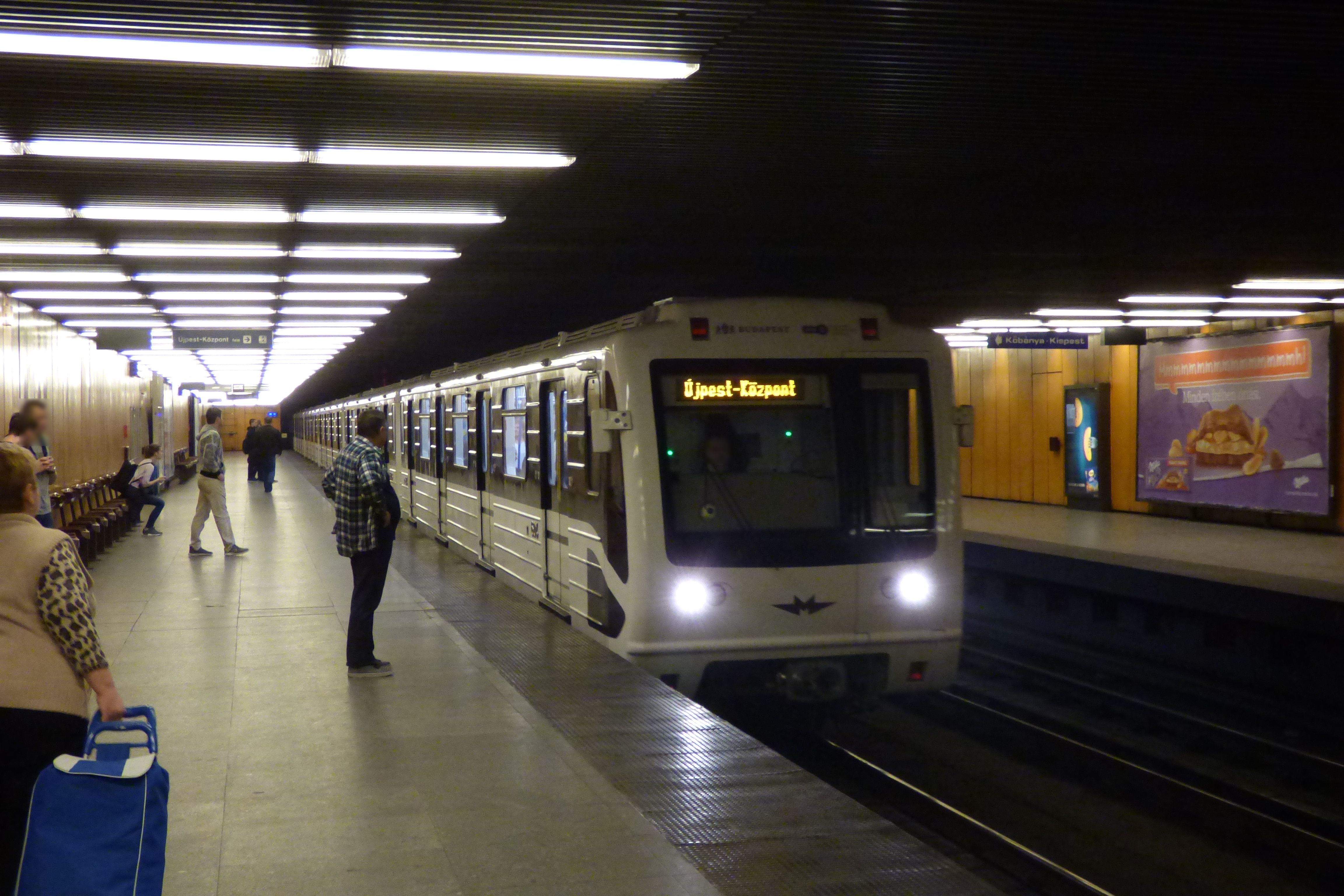 Felújított 81-717-es típusú metró a budapesti 3-as metró Pöttyös utcai állomásán